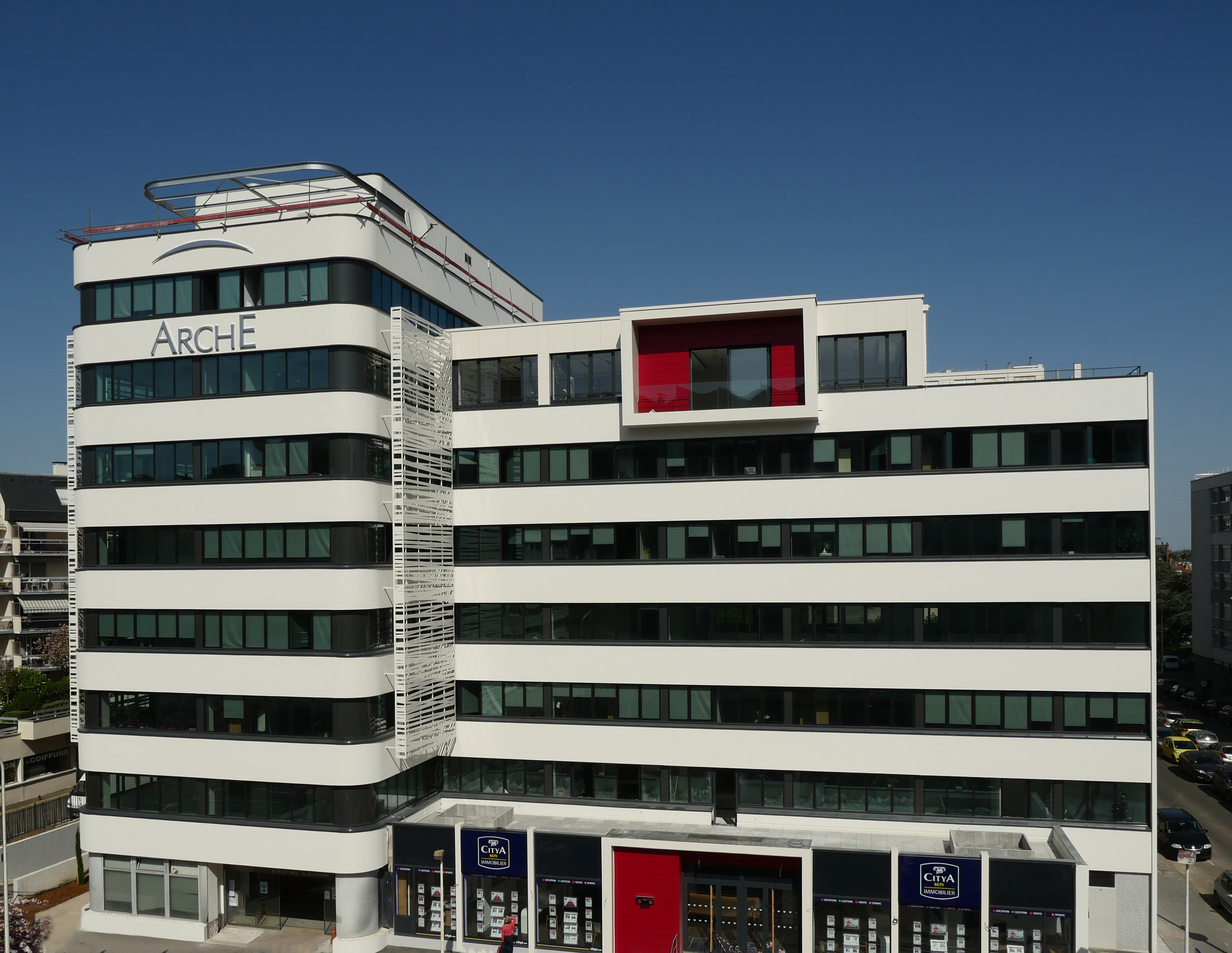 Le siège social de Citya Immobilier est situé au 8-10-12 rue du Docteur Herpin, à Tours.